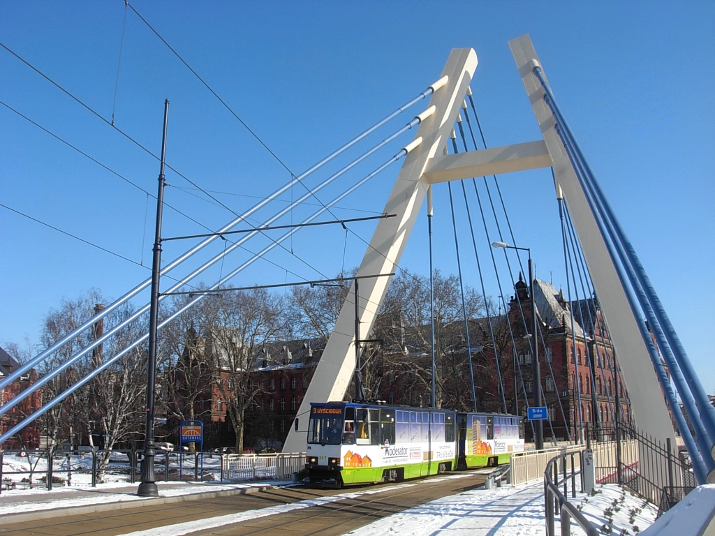 Most tramwajowy nad Brdą im. Władysława Jagiełły w Bydgoszczy